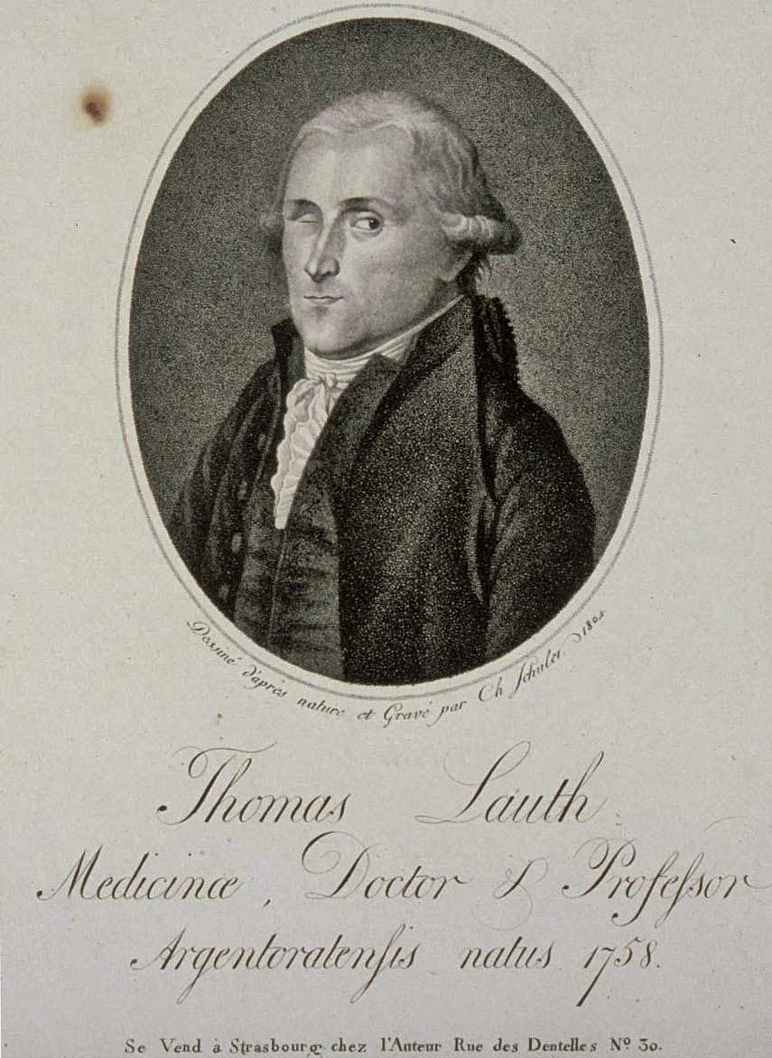 Titre : Thomas Lauth, Medicinae, Doctor et Professor, Argentoratensis natus 1758, Buste, 3/4 à g., en méd. ov Auteur : Schuler, Charles. Illustrateur Éditeur : Schuler Ch (Strasbourg) Date d'édition : 1804 Sujet : Strasbourg Sujet : PORTRAIT, Lauth (Thomas) Type : image fixe Langue : Français Format : 23,4 x 17,4 cm Format : image/jpeg Droits : domaine public Identifiant : ark:/12148/btv1b10208381v Source : Bibliothèque nationale et universitaire de Strasbourg, NIM16563 Relation : Description : Appartient à l’ensemble documentaire : BNUStr003 Provenance : bnf.fr Date de mise en ligne : 23/09/2013